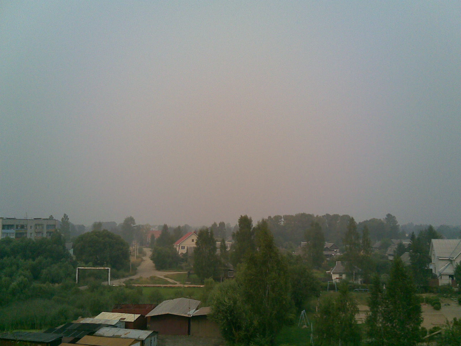 Коттеджи (Ржев)